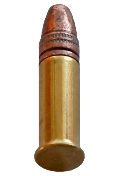 A .22 long rifle rimfire cartridge